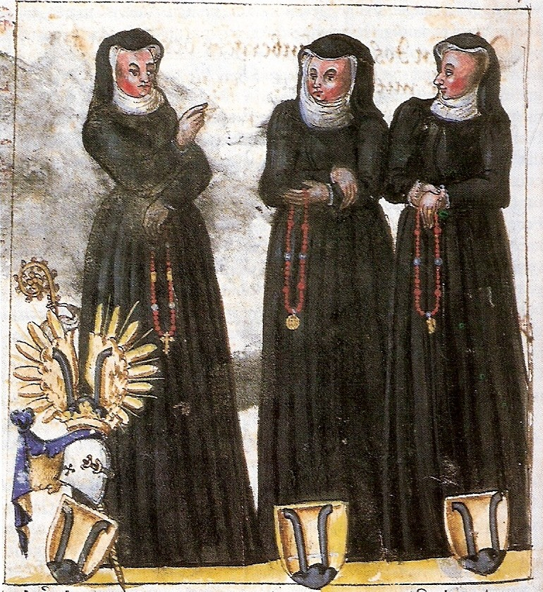 Anna Eisenberger, Äbtissin des Klosters Himmelthal (links); Rechts ihre Schwestern Maria und Eva Eisenberger, Nonnen